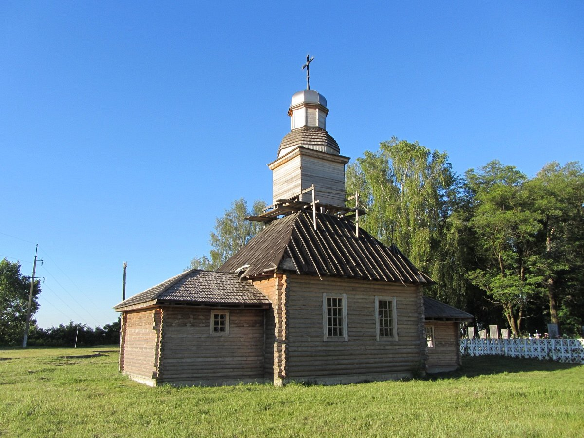 Петрыкаў. Адноўленая Свята-Пакроўская царква